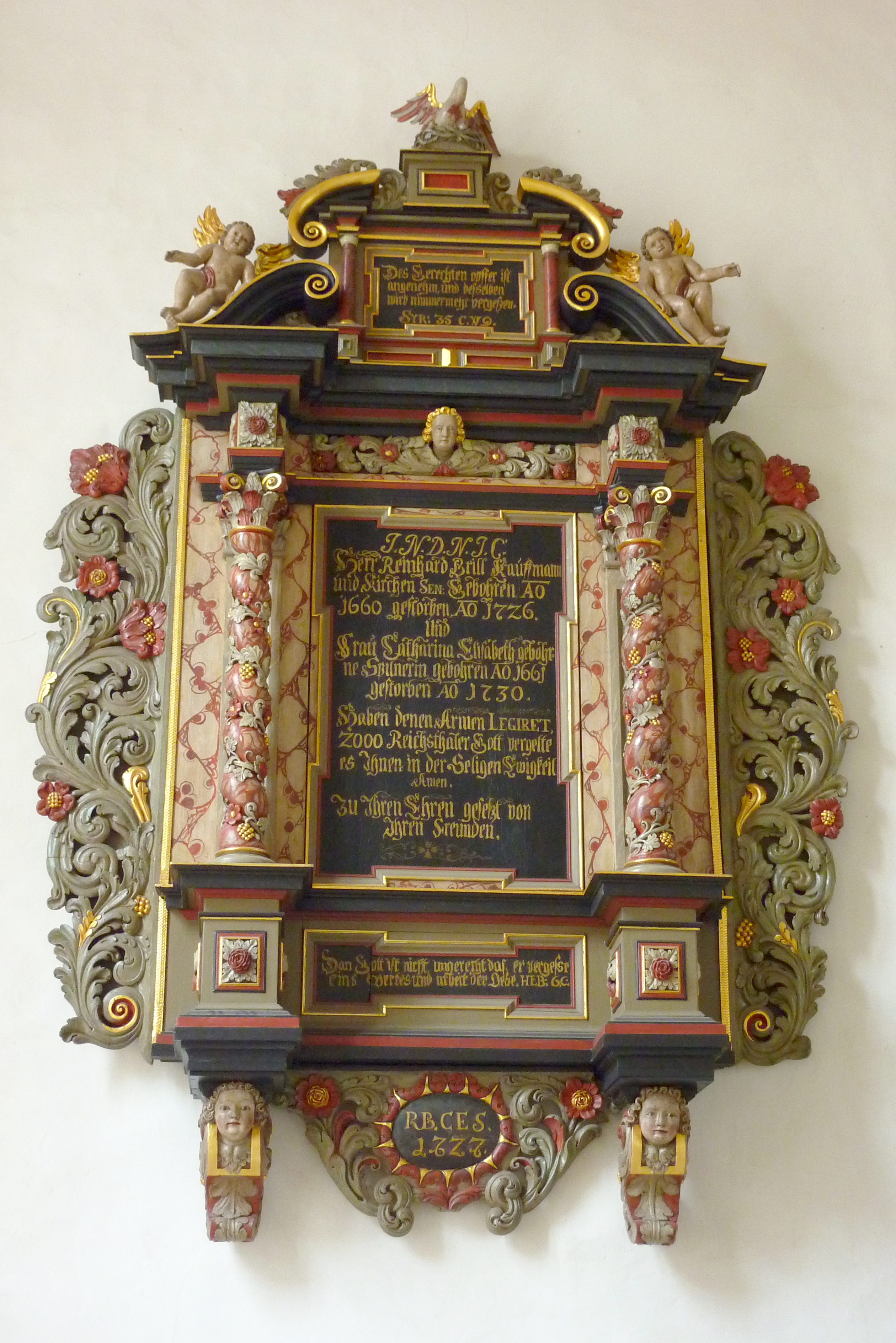 Evangelische Marktkirche St. Dionys in Eschwege im Werra-Meißner-Kreis (Hessen), Epitaph für Reinhard (gest. 1726) und Elisabeth Brill (gest. 1730), von 1727